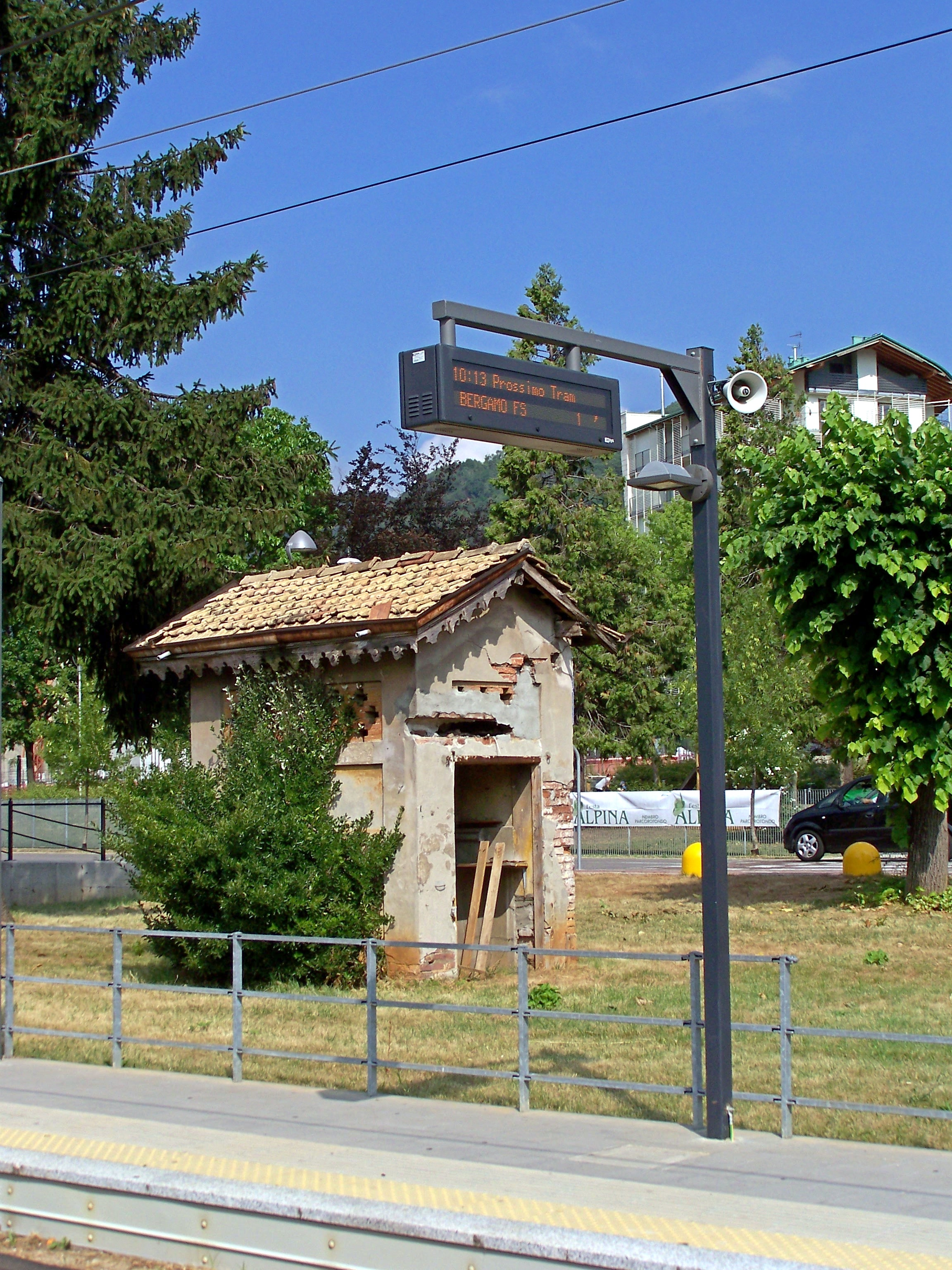 La ritirata della dismessa stazione di Nembro. In primo piano il display elettronico della fermata tranviaria di Nembro Centro, lato Bergamo